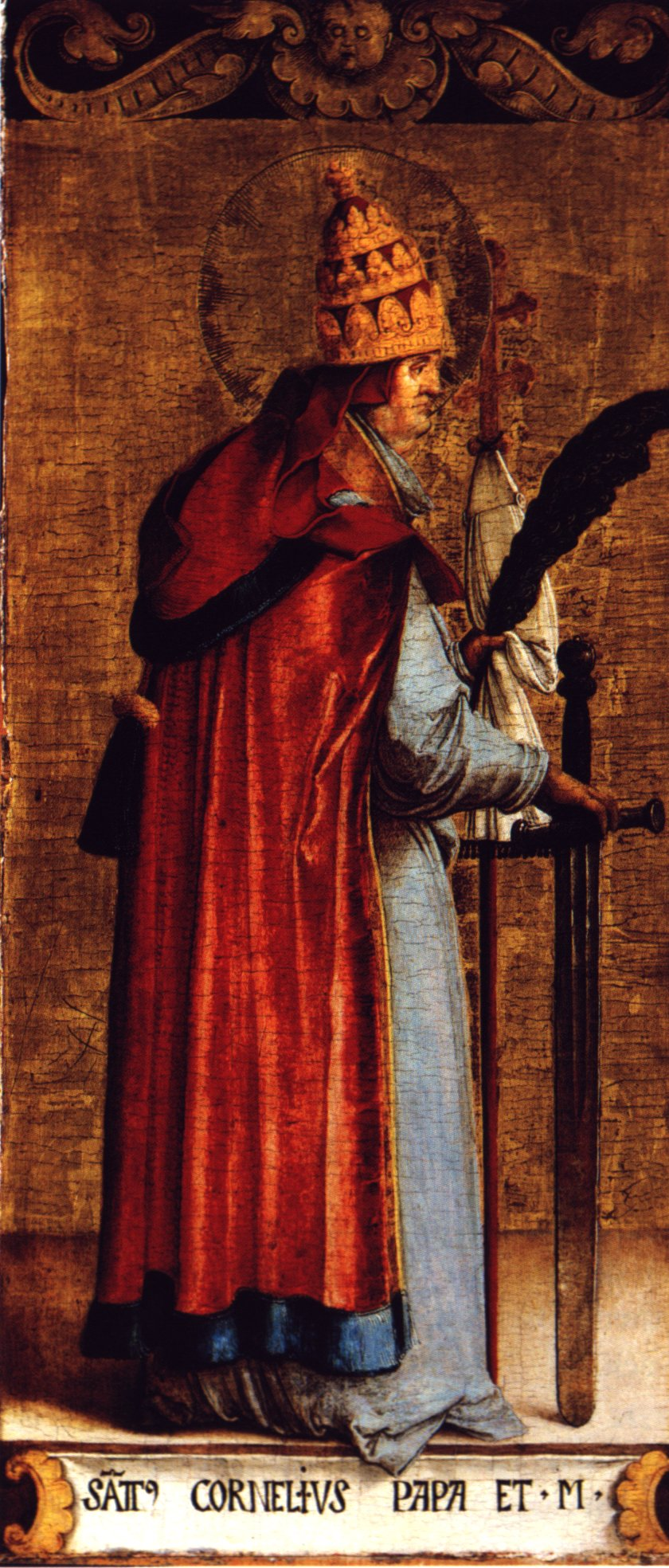 Ausstattung der ehemaligen Seitenaltäre der Meßkircher St. Martinskirche, Standflügel: Heiliger Cornelius als Papst und Märtyrer